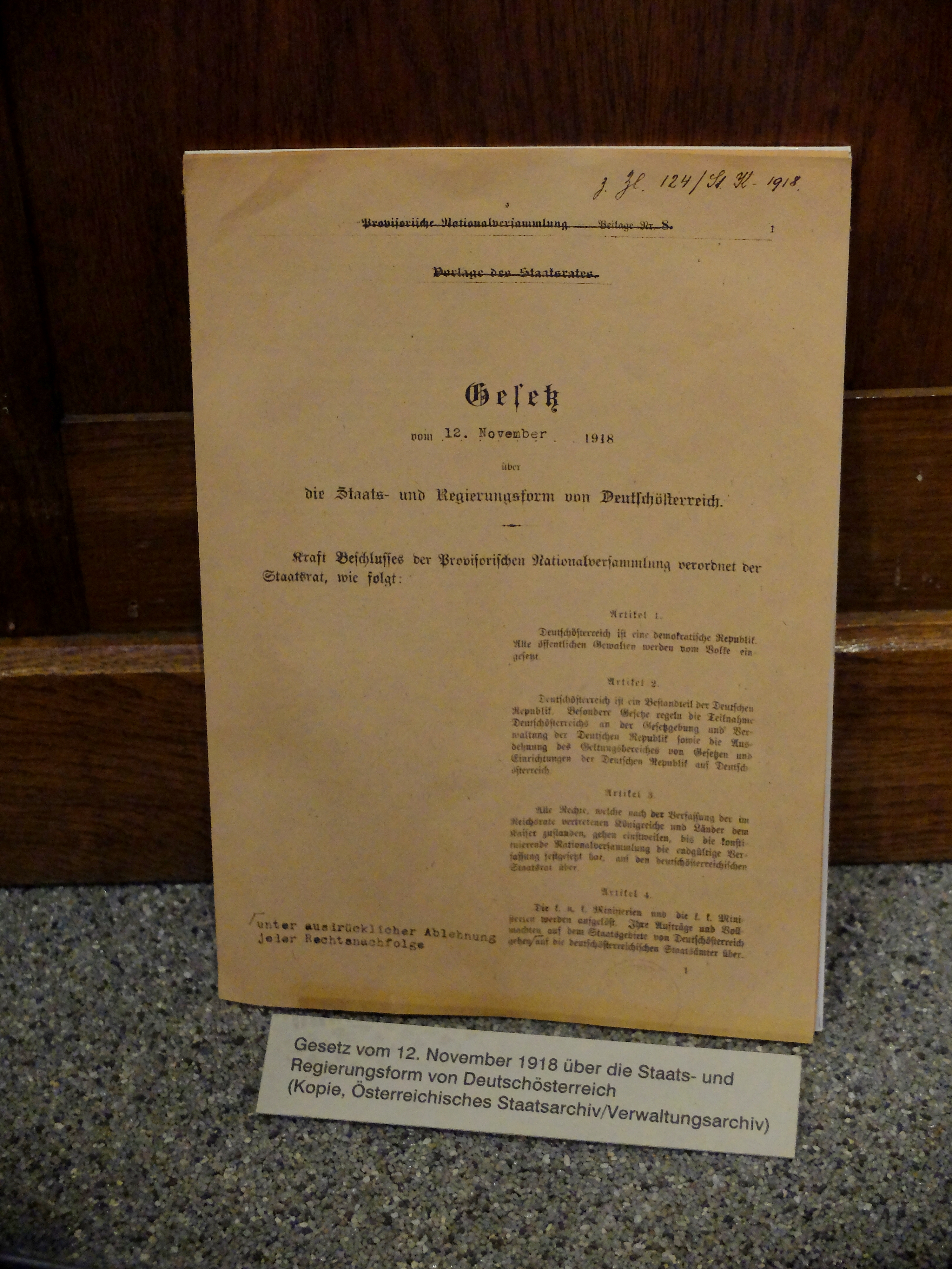 Gesetz Deutsch-Österreich, 12. November 1918, Kopie im Heeresgeschichtlichen Museum Wien